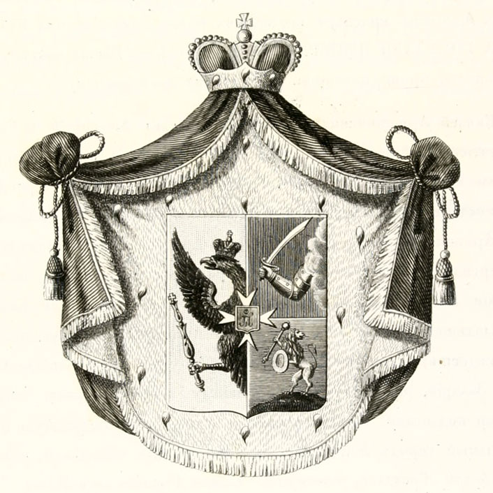 Gerb roda Kniazei Argutinskikh-Dolgorukikh